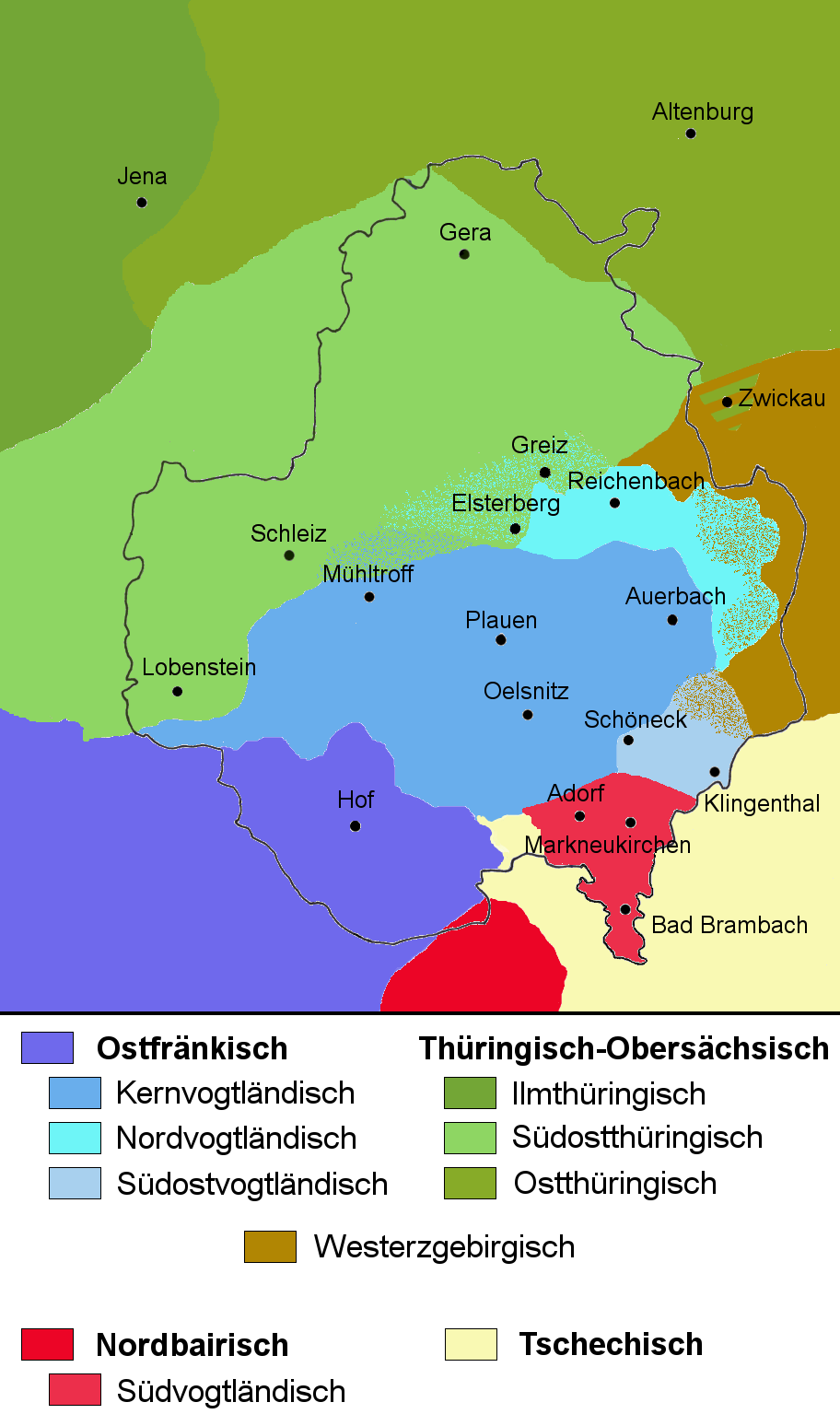 aktuelle Mundartgebiete im Vogtland